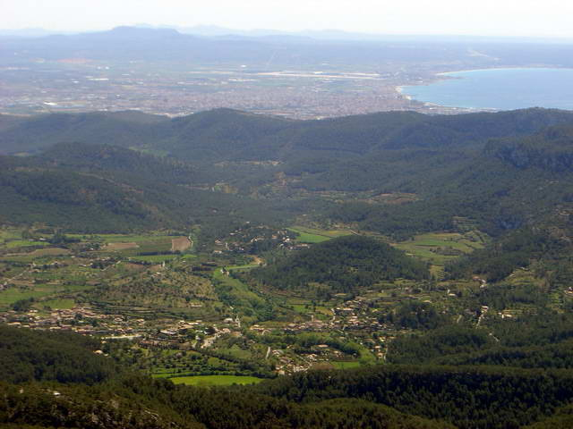 Puigpunyent, amb Palma al fons, vist des del Galatzó. Mallorca.